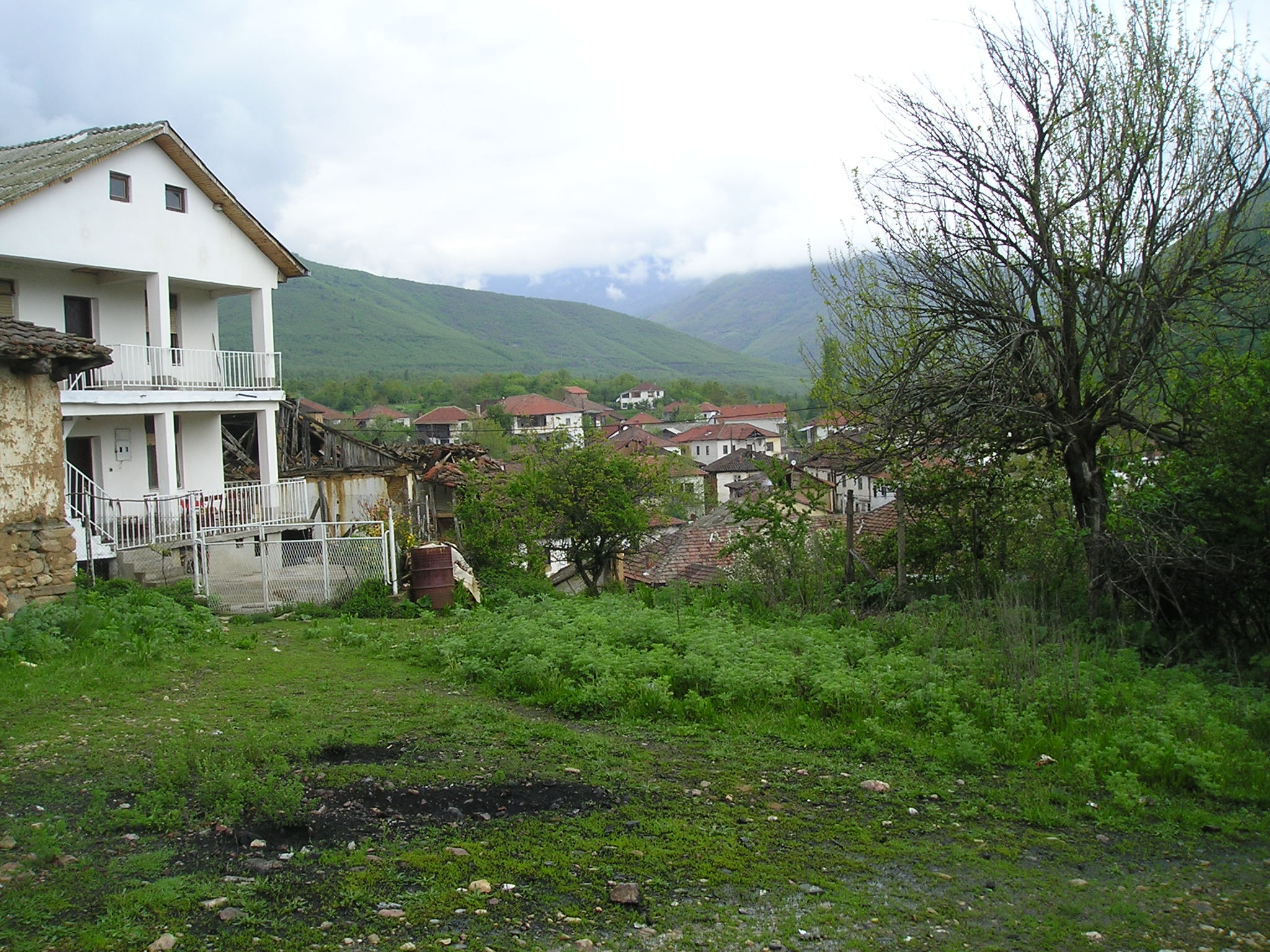 Богомила, велешко, Македонија